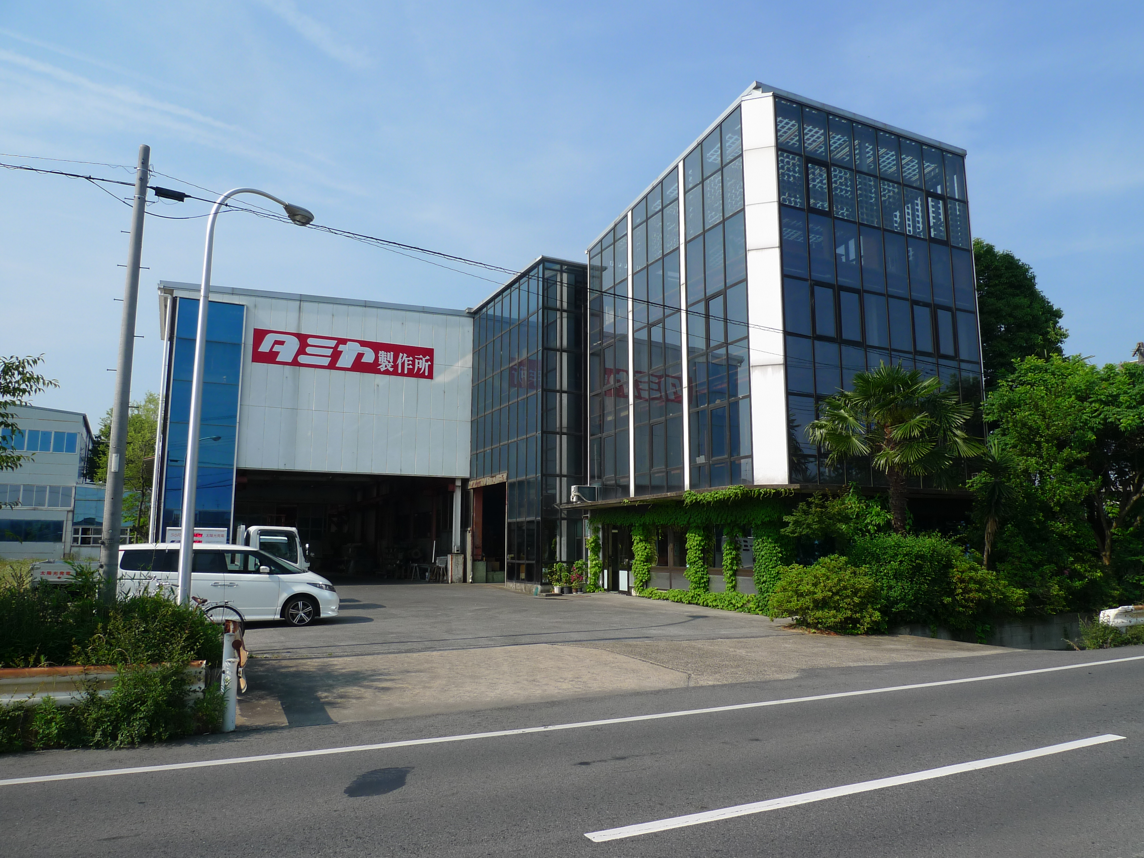 株式会社 タミヤ製作所 本社工場